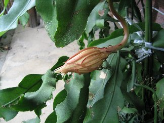 Epiphyllum oxypetalum